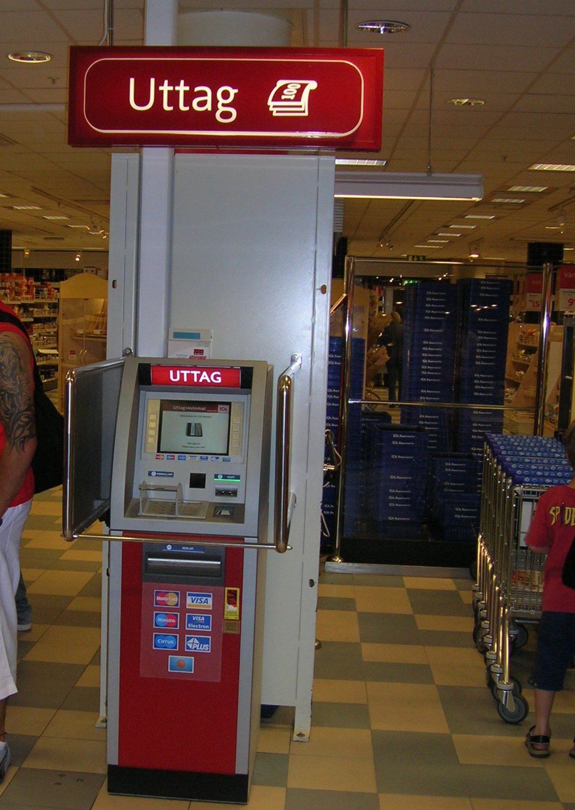 ICA:s uttagsautomat, Ringens köpcentrum, Stockholm, Sweden.